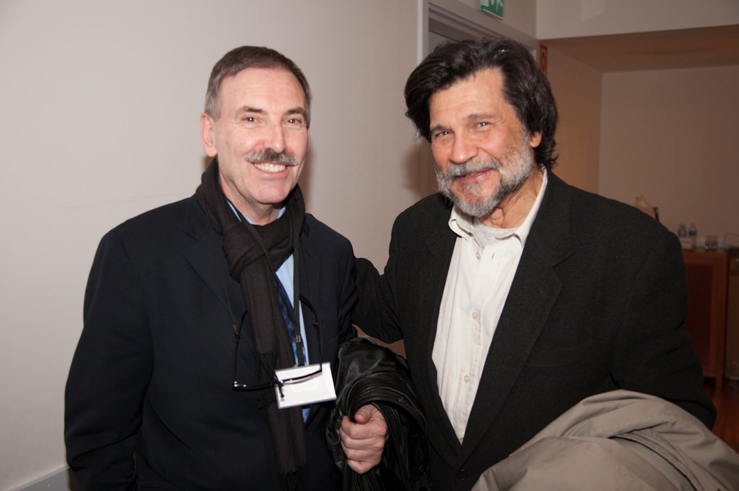 Santos Zunzunegui y Victor Erice